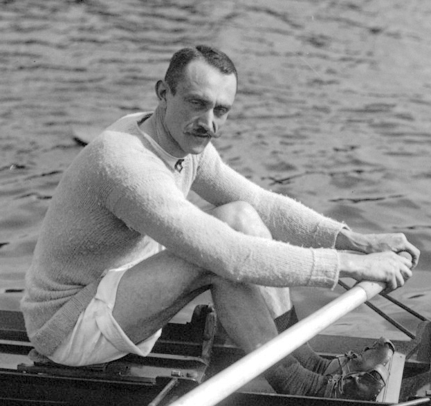 [24-8-13, Gand] P. Veirman [finaliste du championnat d'Europe de un rameur dans son bateau sur le canal Gand-Terneuzen] : [photographie de presse] / [Agence Rol]